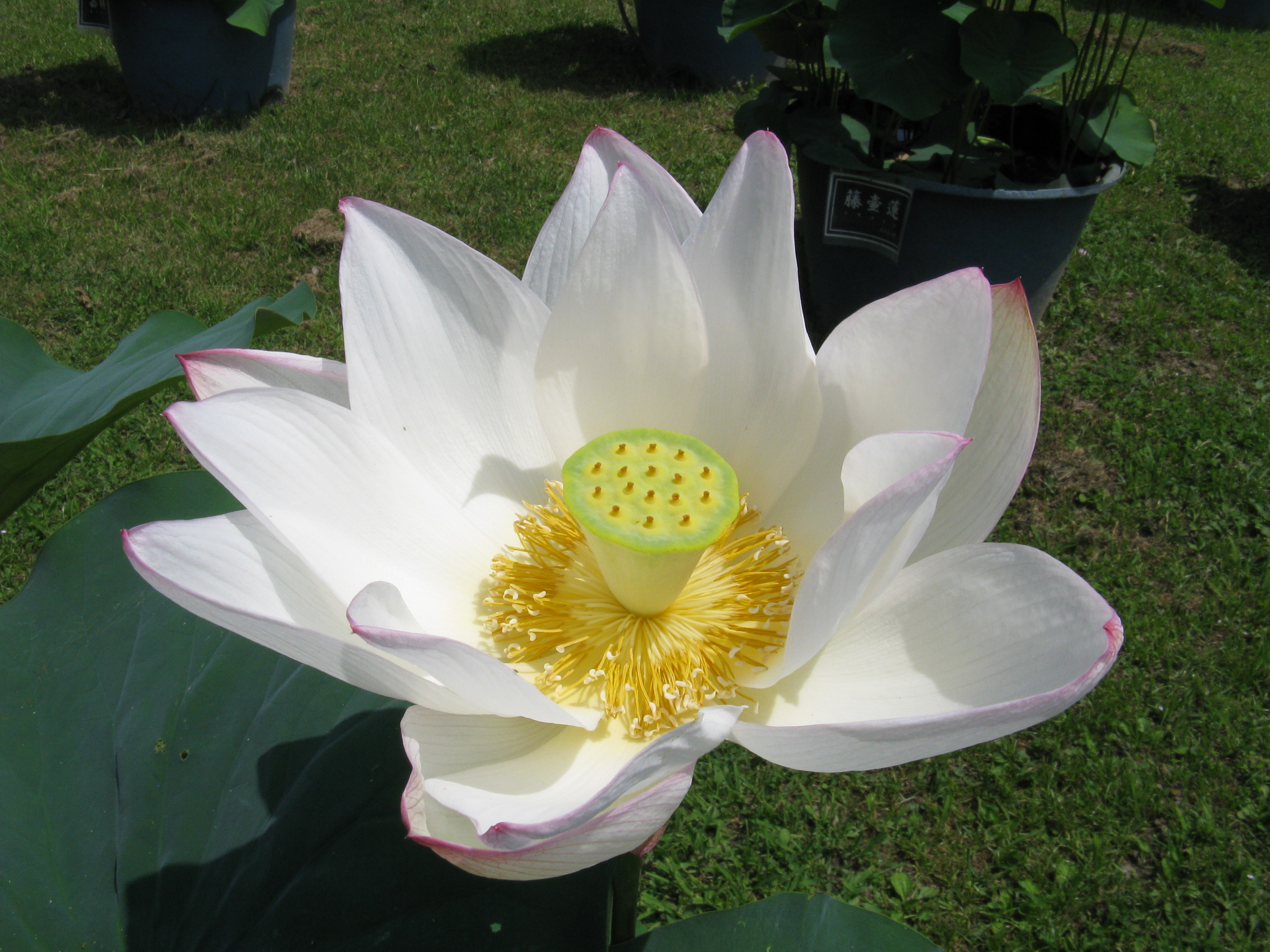 Scientific name Nelumbo nucifera cv. Kinrinren